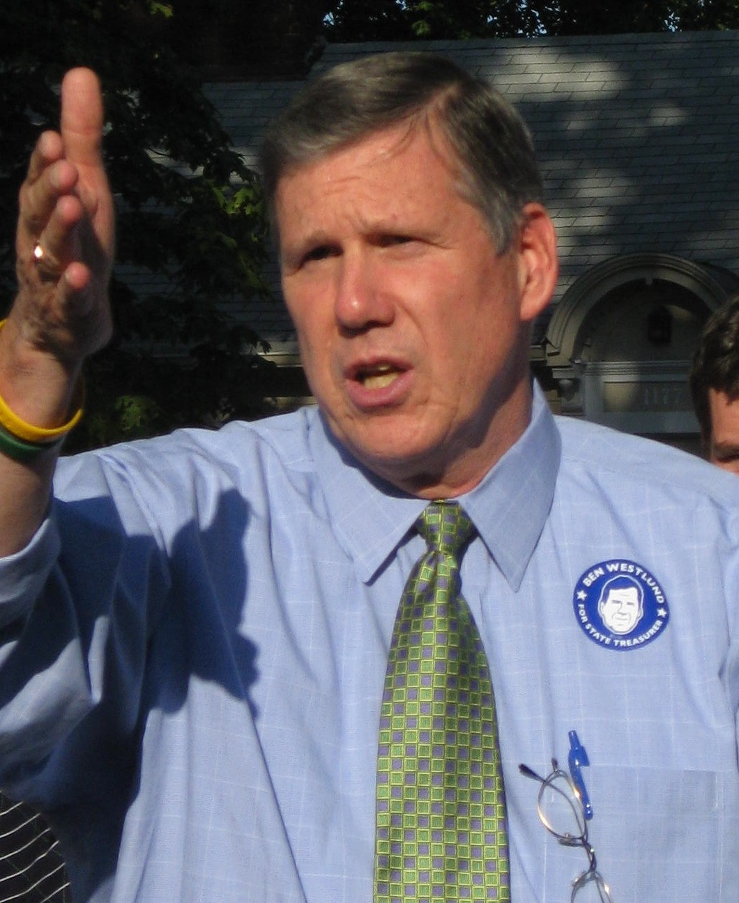 Forward Oregon Open House in Eugene, Oregon